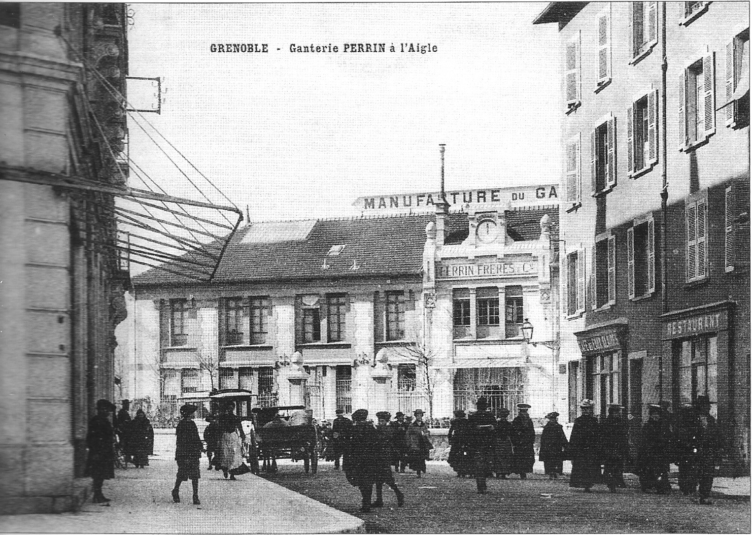 Ganterie Perrin, rue irvoy - Grenoble vers 1900